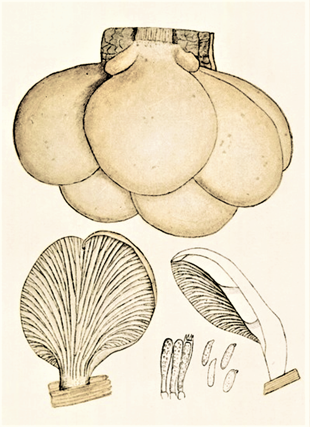 Giacomo Bresadola: 1. Pleurotus pulmonarius (Fr., 1821) Quél. (1872)